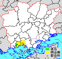 岡山県浅口郡の範囲